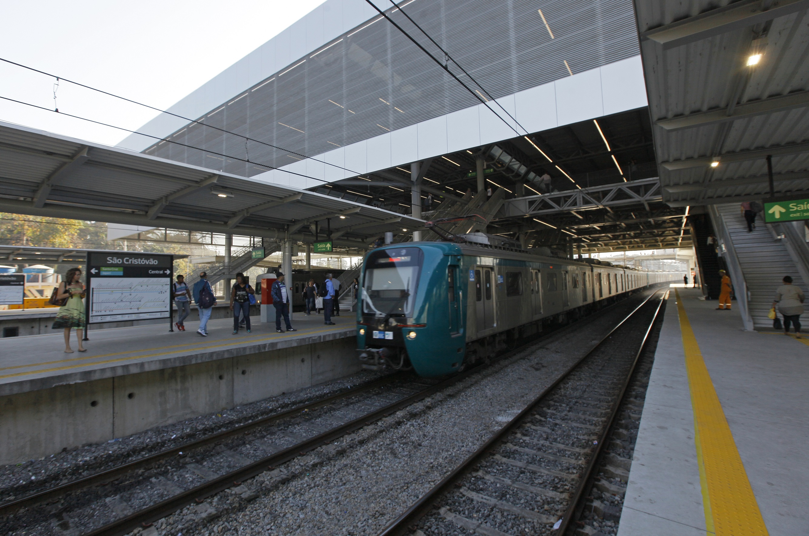 Estação Olímpica de São Cristóvão, depois da reforma para as olimpíadas do Rio de Janeiro.